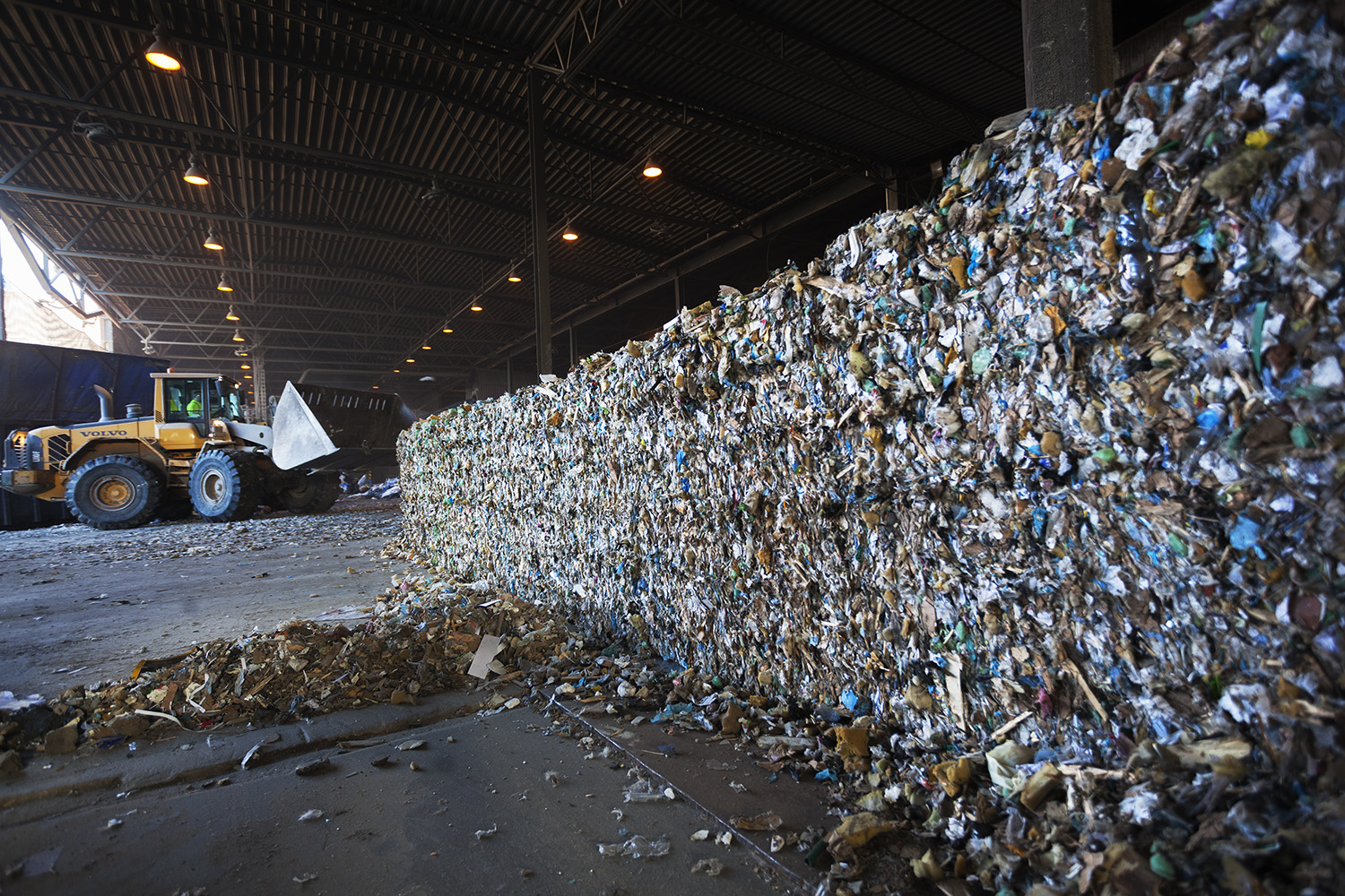 Gjenvinning av papp og papir ved Franzefoss Gjenvinning AS avd. Haraldrud.